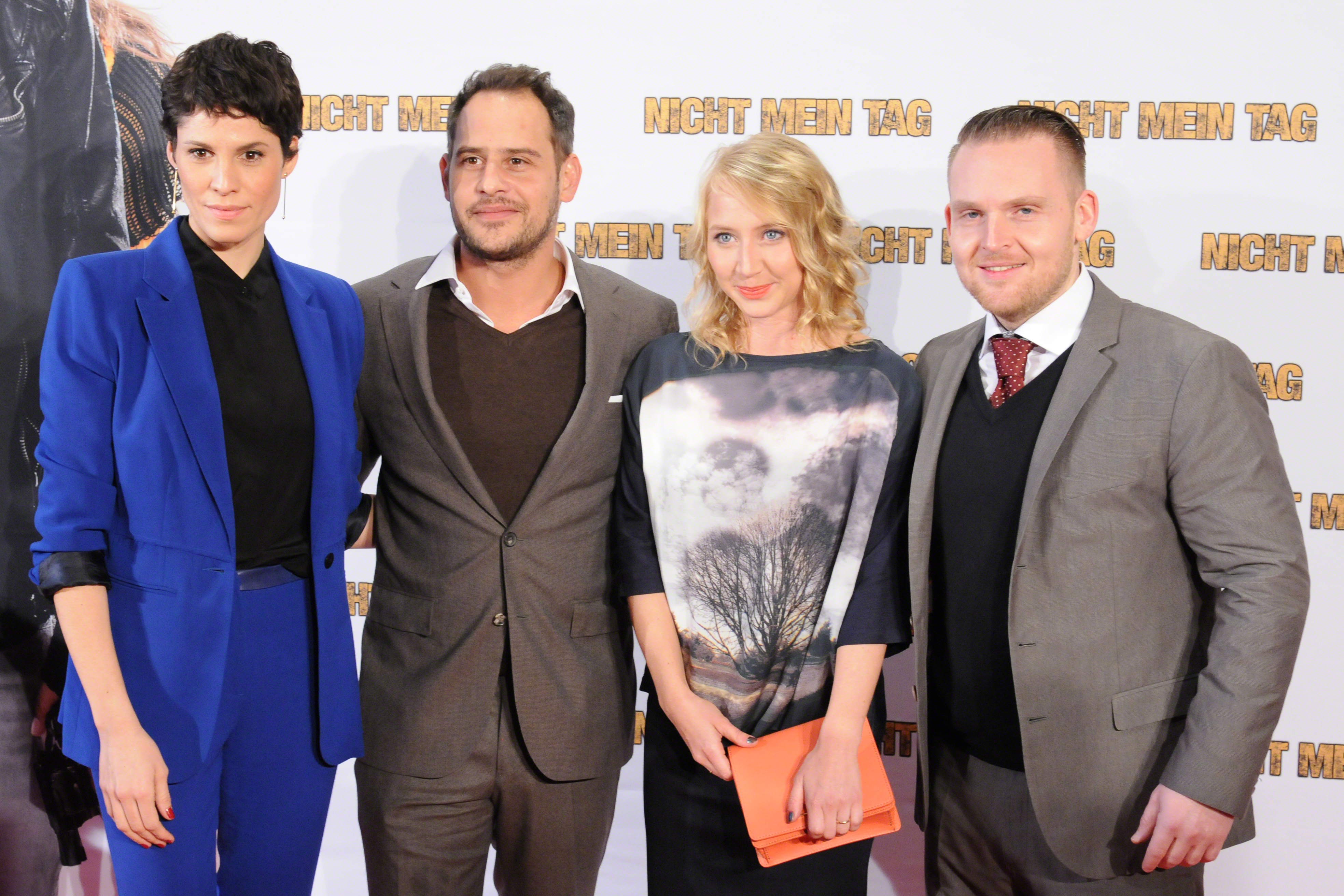 Jasmin Gerat, Moritz Bleibtreu, Anna Maria Mühe und Axel Stein (von links nach rechts) auf der Weltpremiere des Films "Nicht mein Tag" in Bochum am 12. Januar 2014